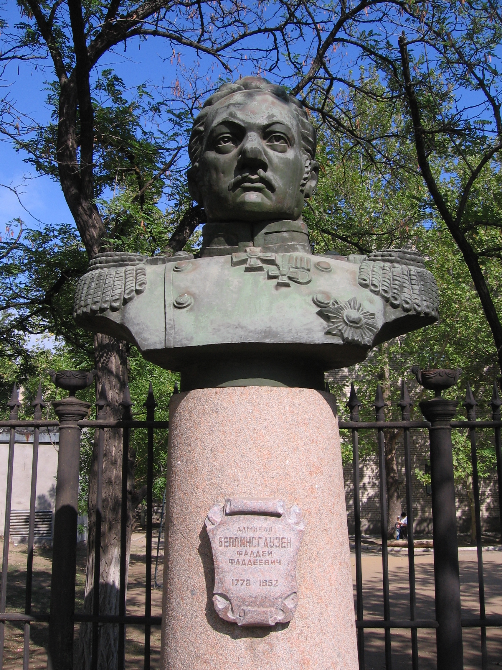 Бюст адмірала Белінсгаузена Ф.Ф., знаходиться біля музею суднобудування , м. Миколаїв